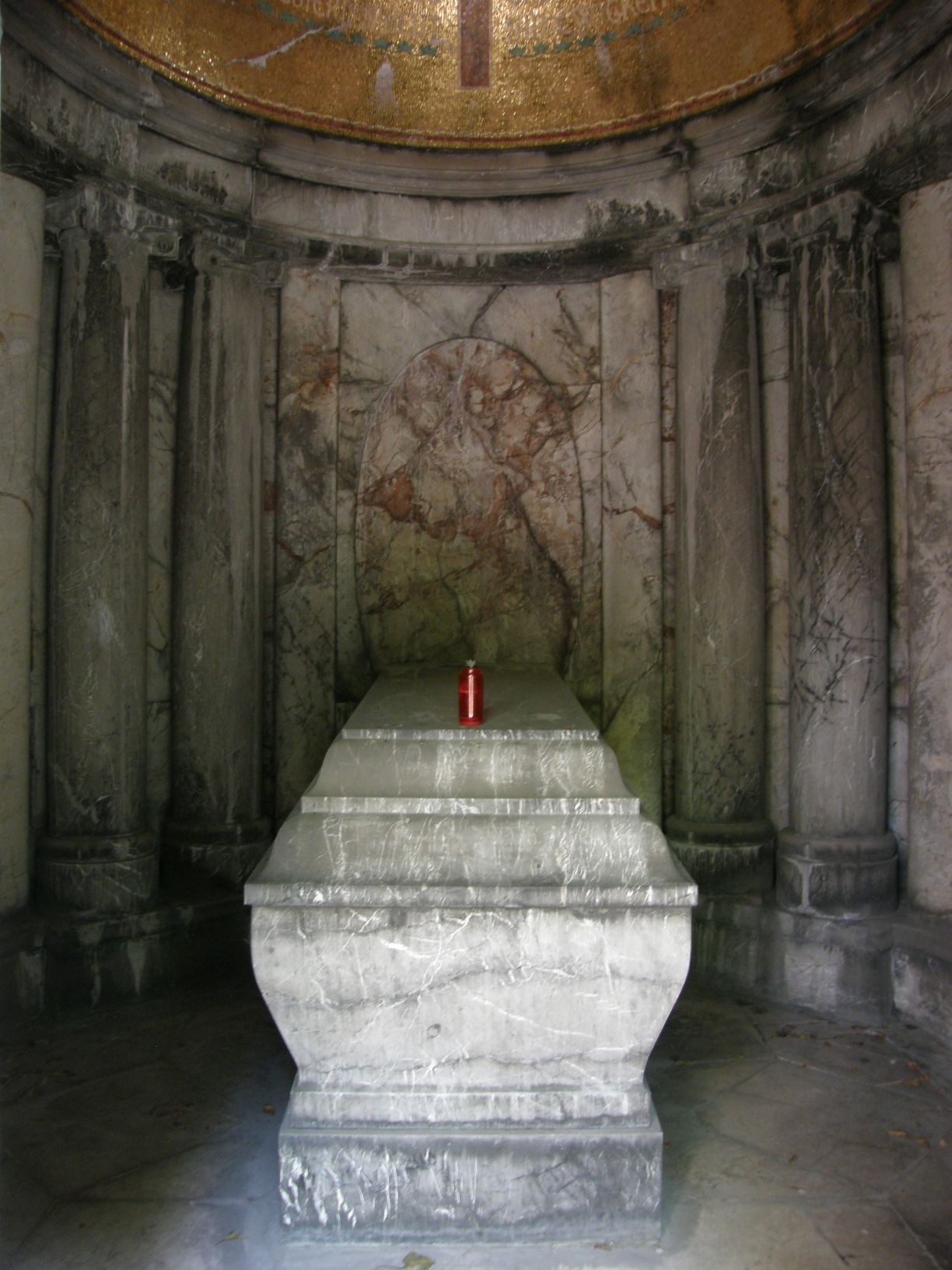 Luisenfriedhof I in Berlin - Innenraum mit Steinsarkophag des Mausoleums für Ida von Blücher. Entwurf von Paul Wittig.